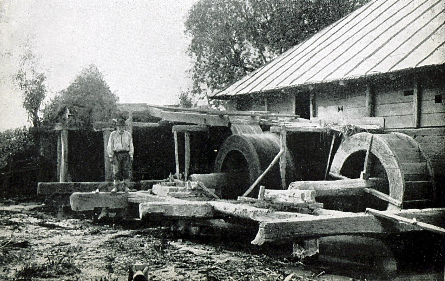 1916 - Album foto - Ramnicu Sarat - Moara